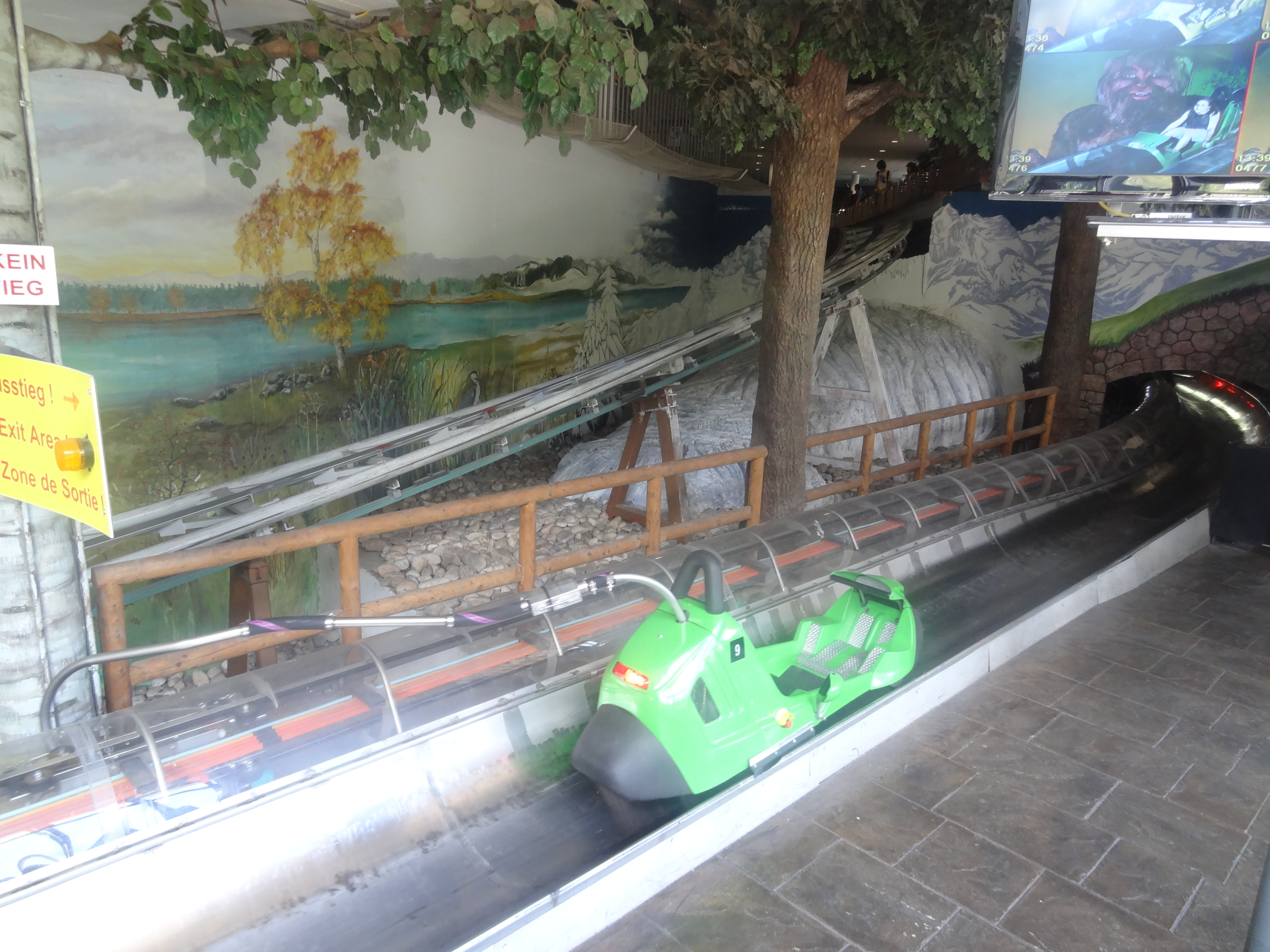 Space Runner à Steinwasen Park